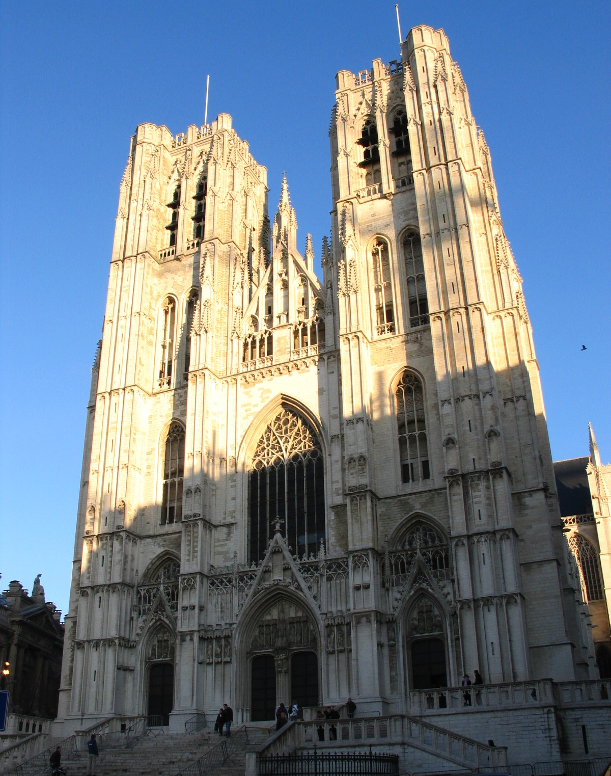 Kathedraal van Sint Michiel en Sint Goedele te Brussel